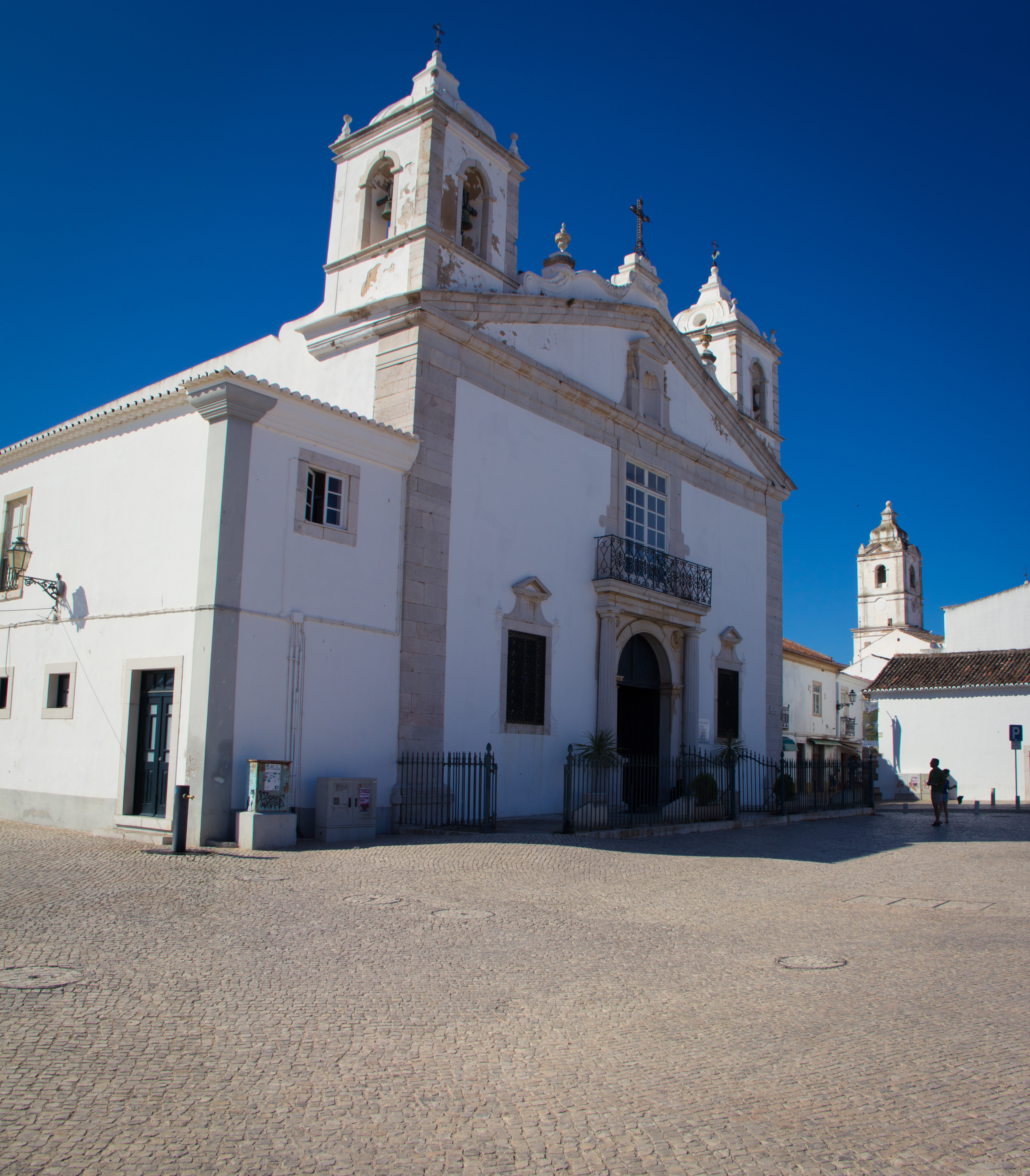 _MG_8803-Edit.jpg